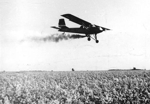 LPG Trinwillershagen, Insektenbekämpfung, Agrarflieger Zentralbild Dittrich 15.6.1958 Rapsglanzkäferbekämpfung durch das Flugzeug. Auf der LPG in Trinvillershagen hat die Deutsche Lufthansa ein Flugzeug zur Bekämpfung des Rapsglanzkäfers auf einem 20 ha großen Feld eingesetzt. UBz: Das Flugzeug (Typ: Aero L-60) beim Bestäuben des Rapses in etwa 5 m Höhe.